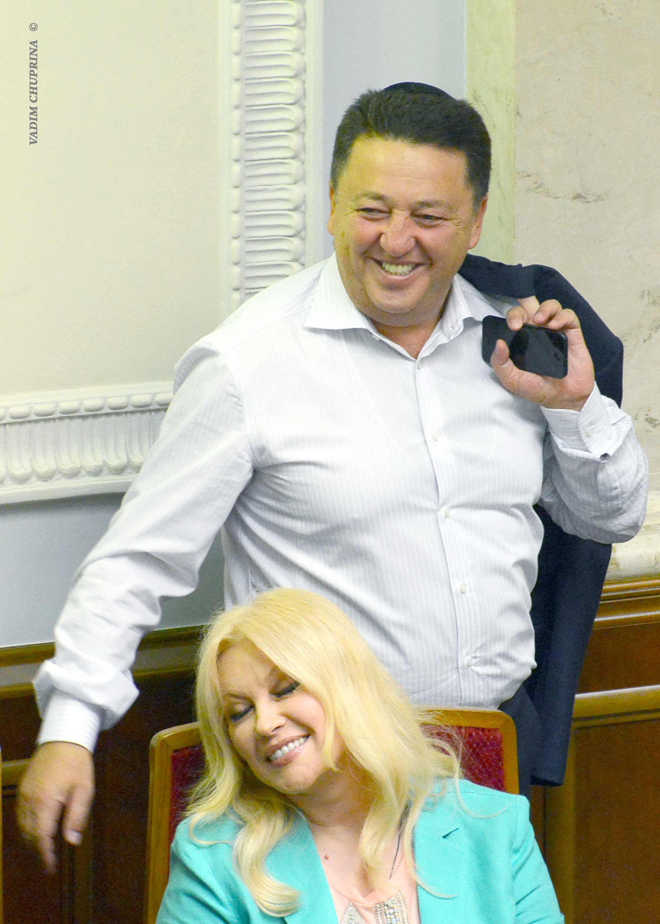 ВЕРХОВНА РАДА УКРАЇНИ 2013 , фото Вадим Чуприна